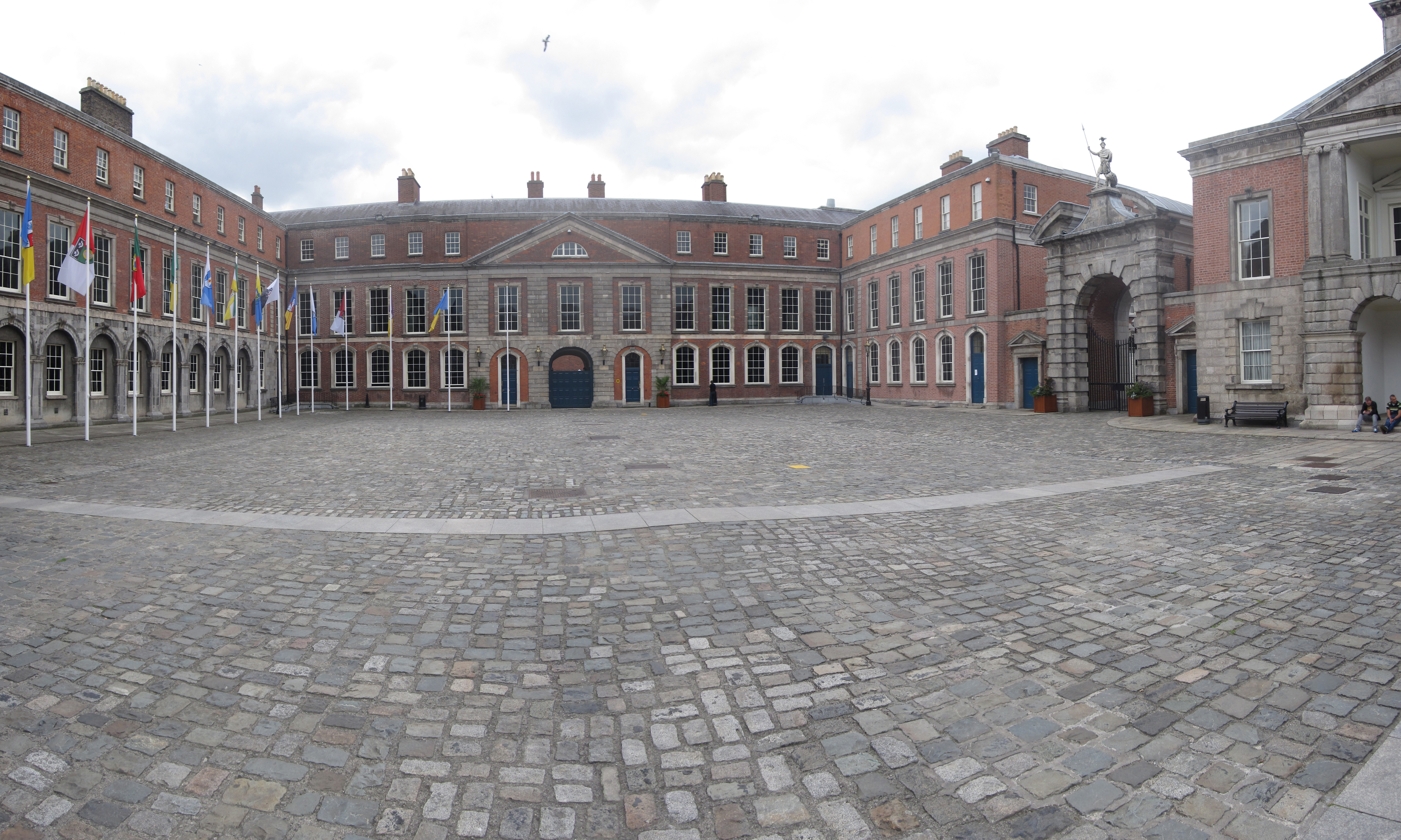 Panorama im Innenhof des Dublin Castles